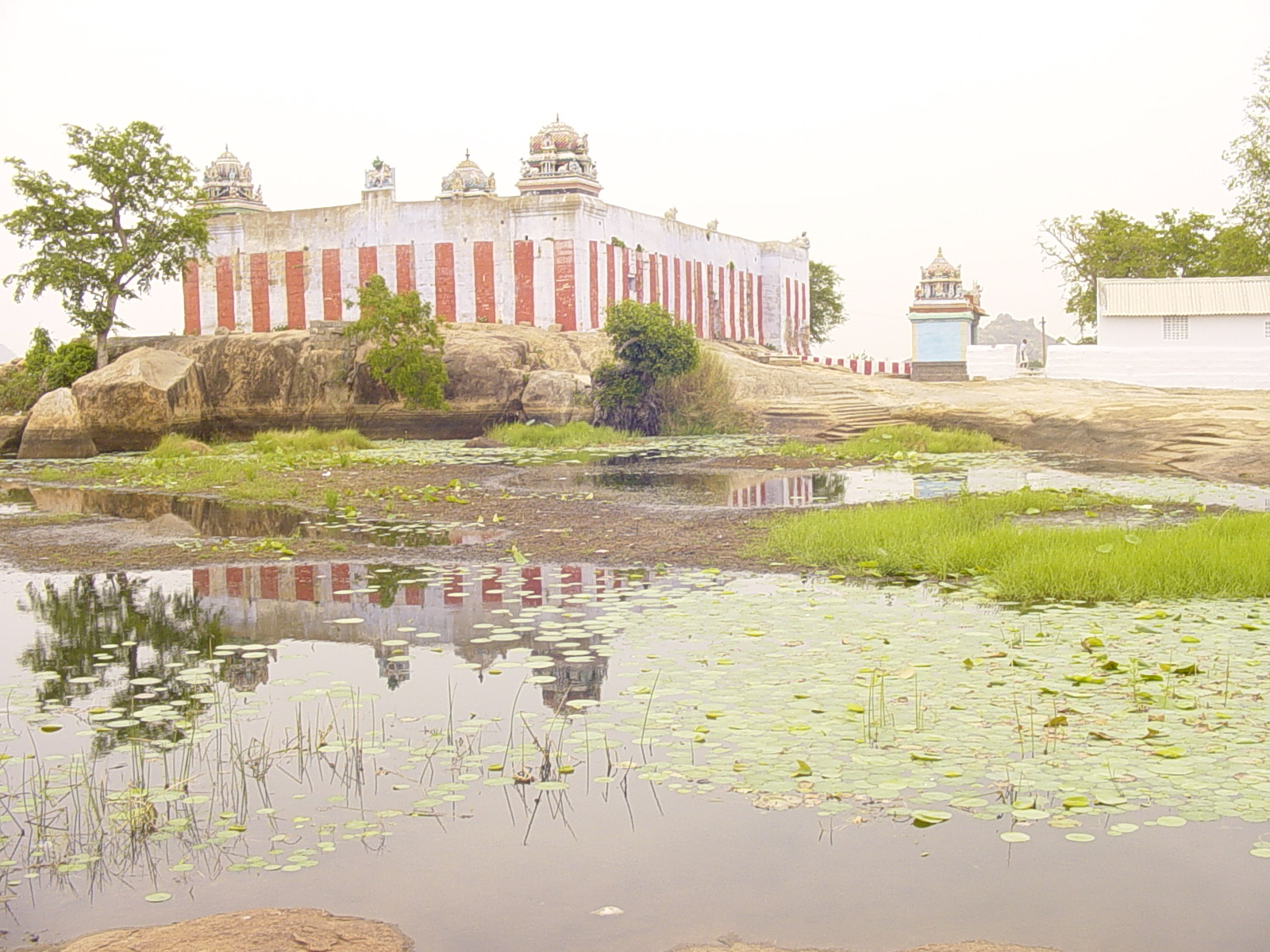 மதுரை மாவட்டம் திருச்சுனையில் மலைமீது அமைந்திருக்கும் சிவாலயத்தின் அழகிய தோற்றம்.